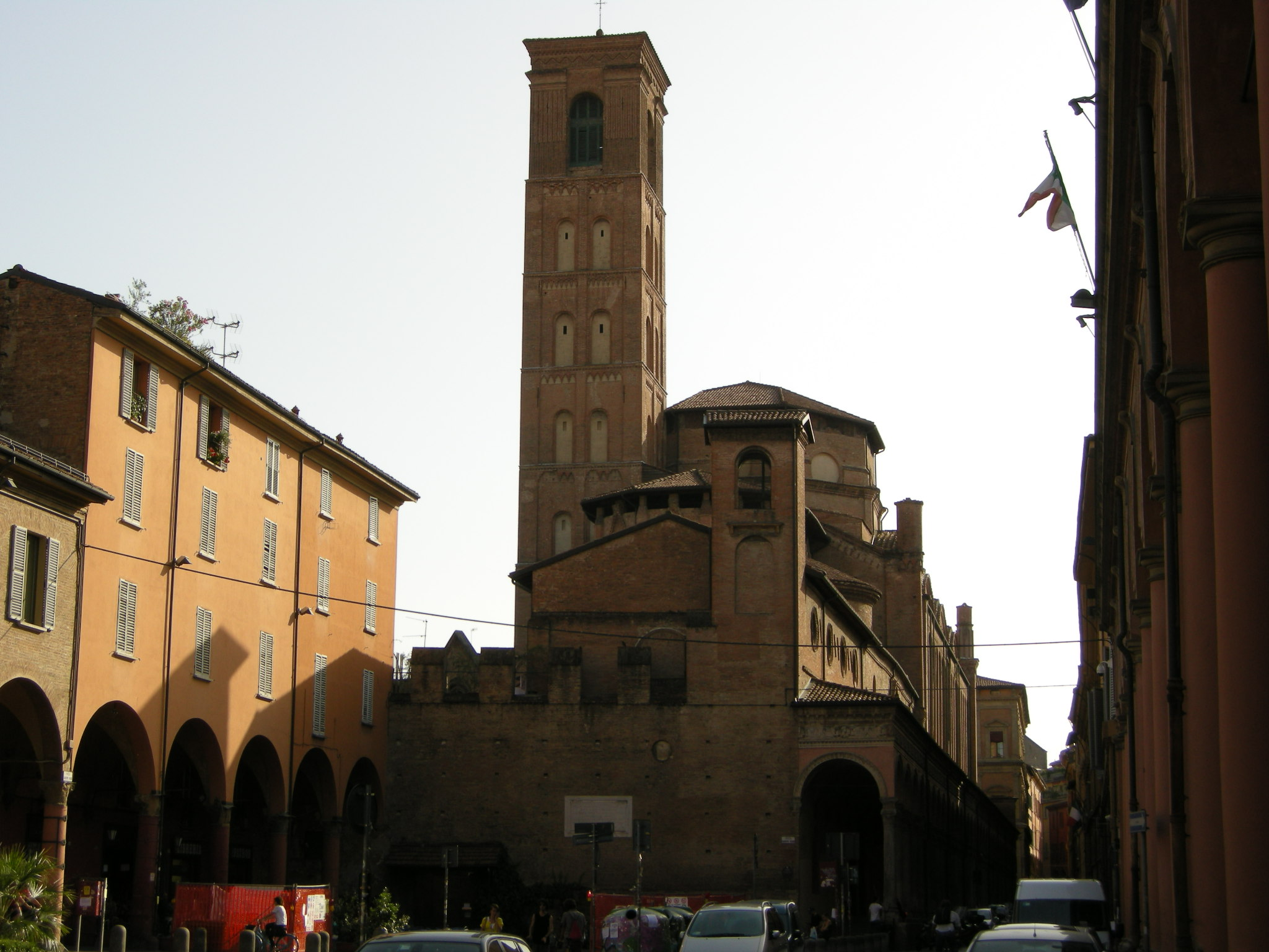 Bologna, san giacomo maggiore, retro